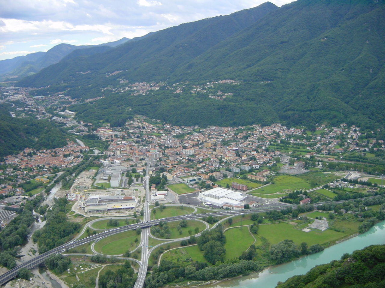 Gravellona-Toce, Piemonte, Italia